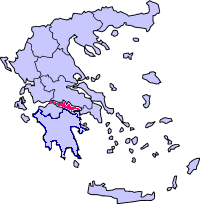 מיקומו של מפרץ קורינתוס - נלקח מוויקי באנגלית, שונה על ידי. מקור: image:Peripheries of Greece.png